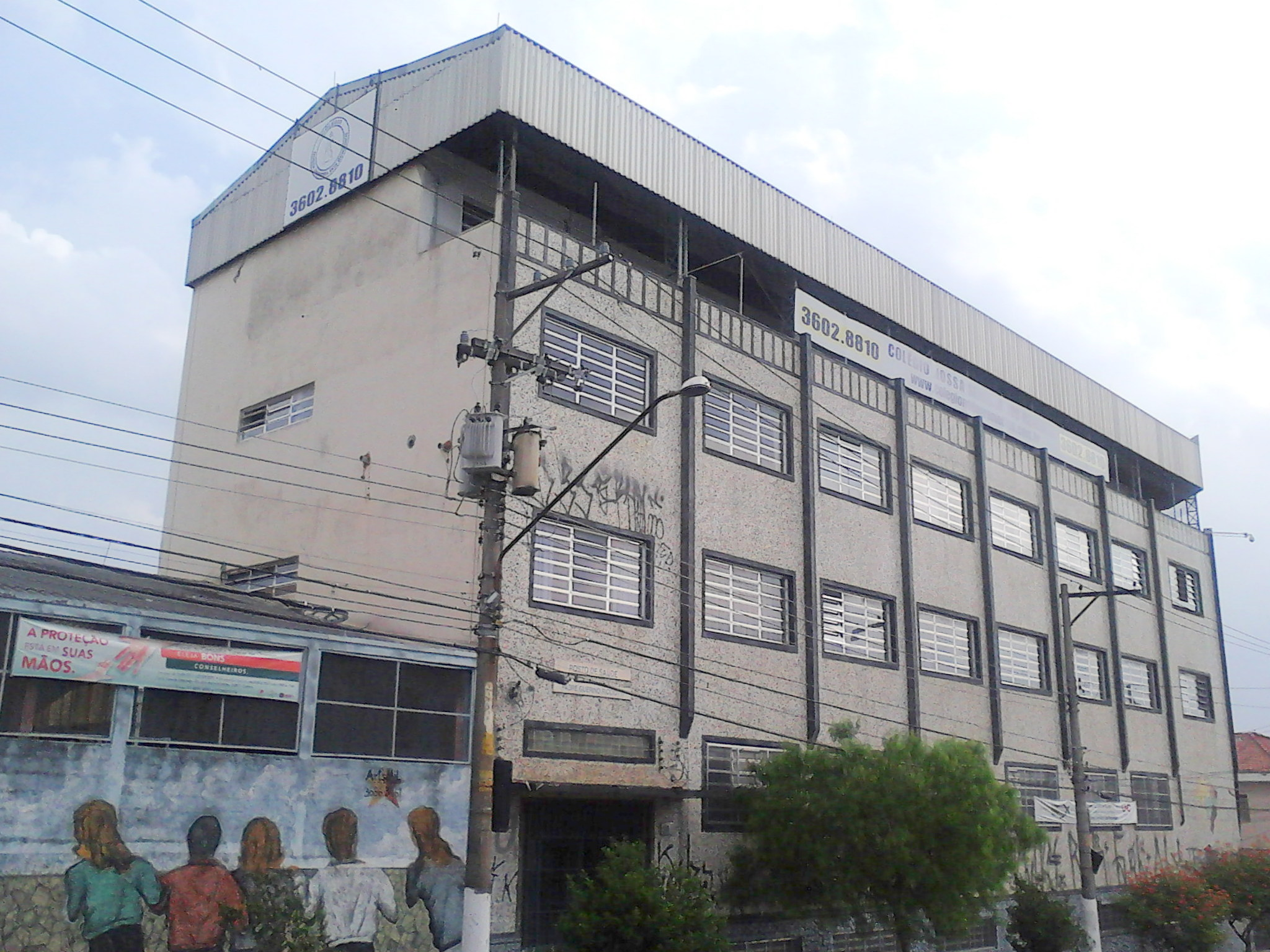 Colégio Nossa Senhora dos Remédios, na Vila dos Remédios, Osasco, SP, Brasil.